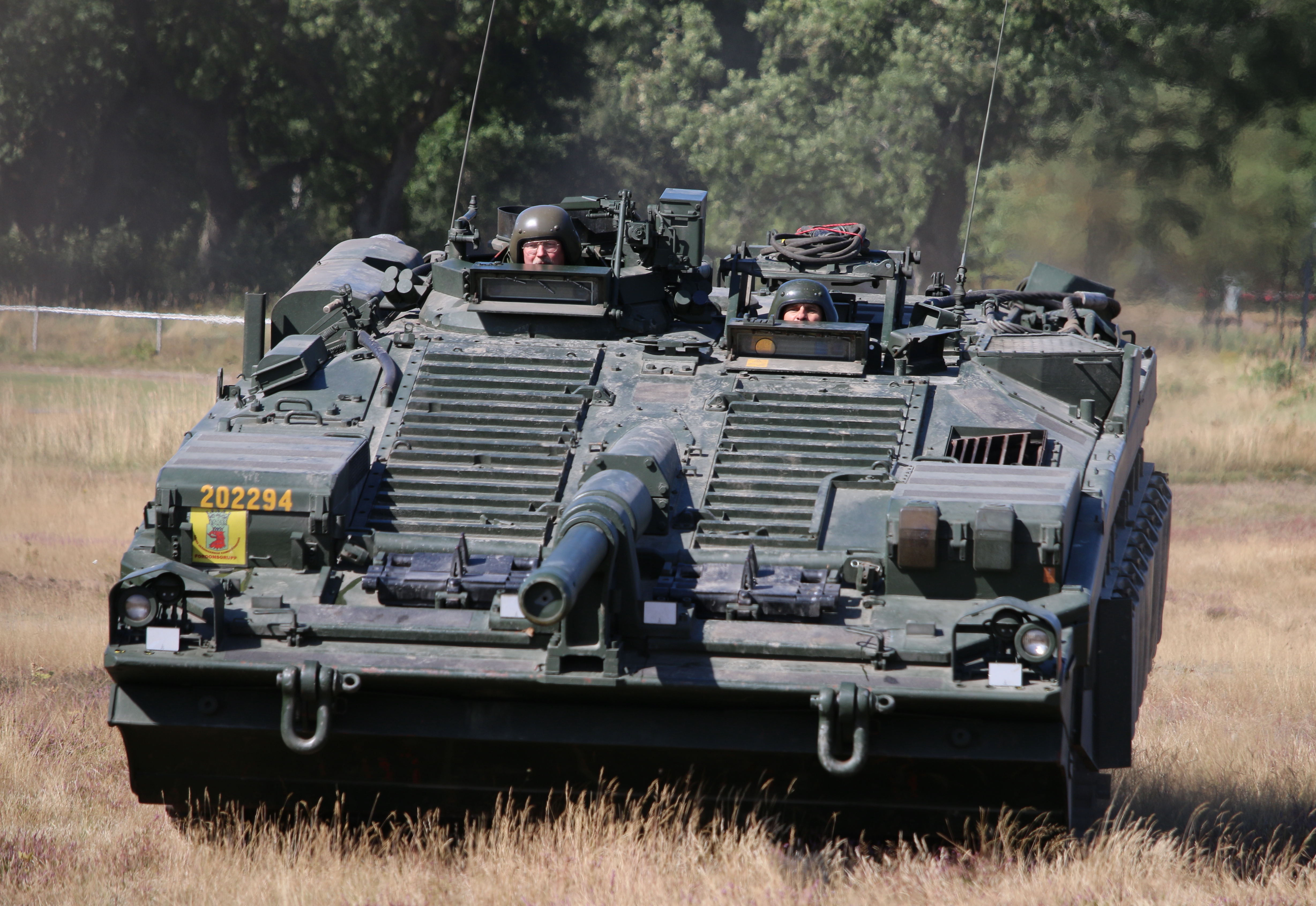 Stridsvagn 103 Revinge 2015